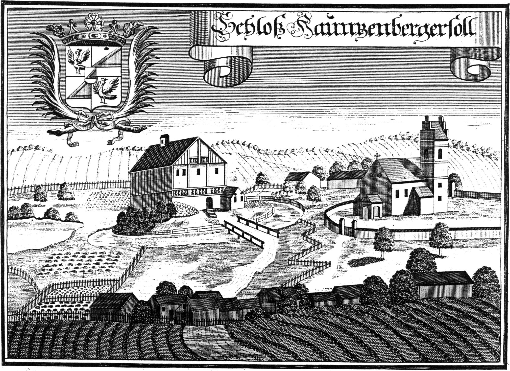 Haunzenbergersöll um 1700, Kupferstich von Michael Wening